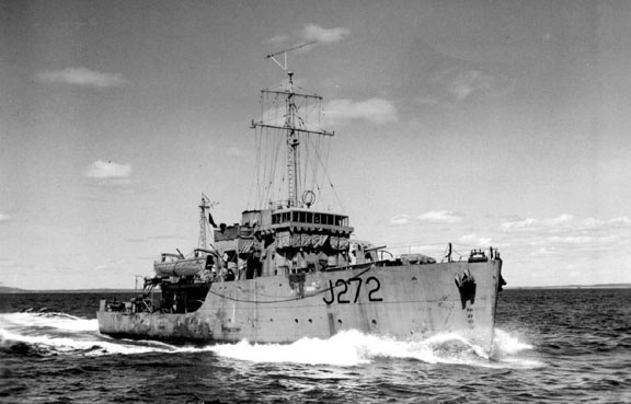 HMCS Esquimalt